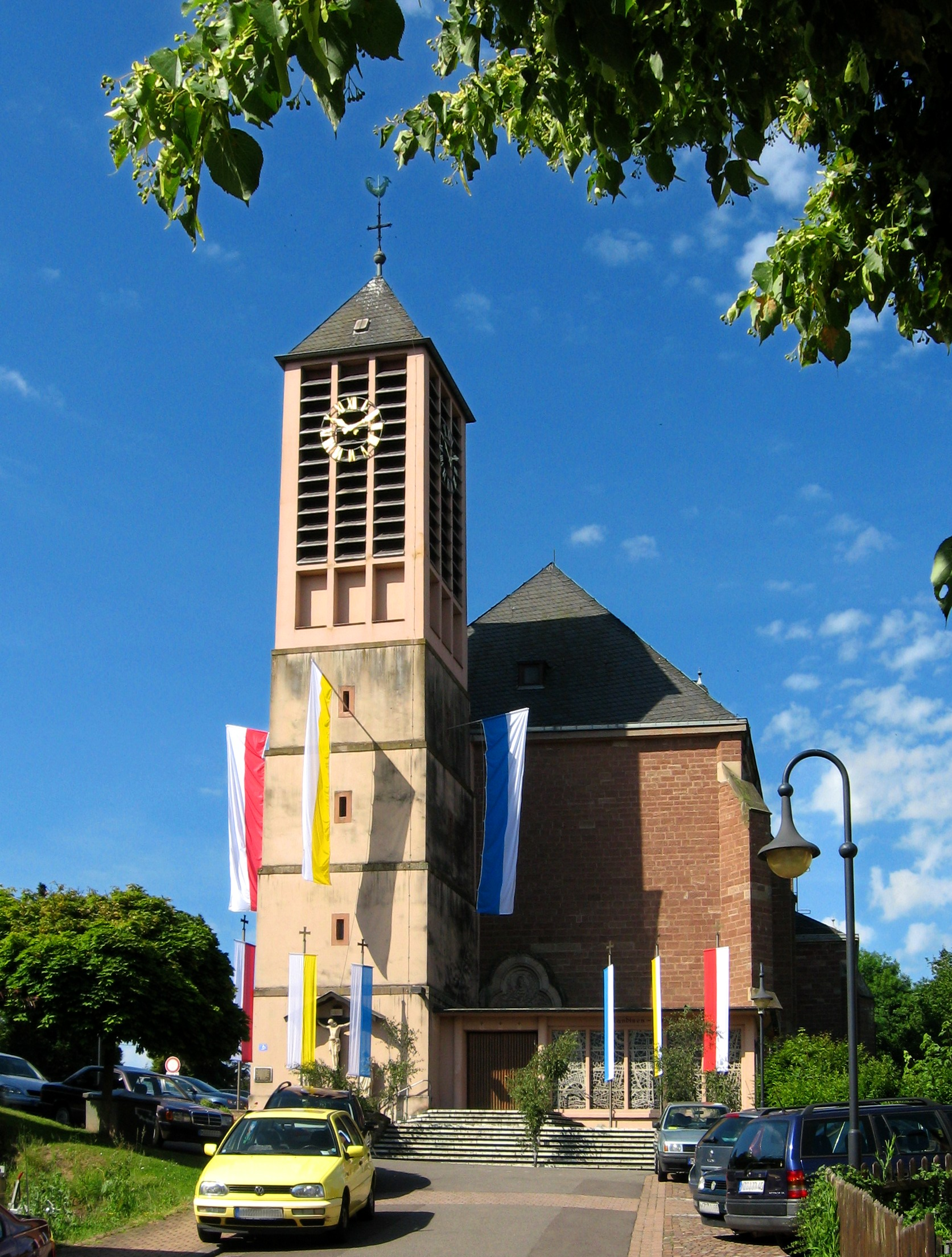 Kirche Düppenweiler